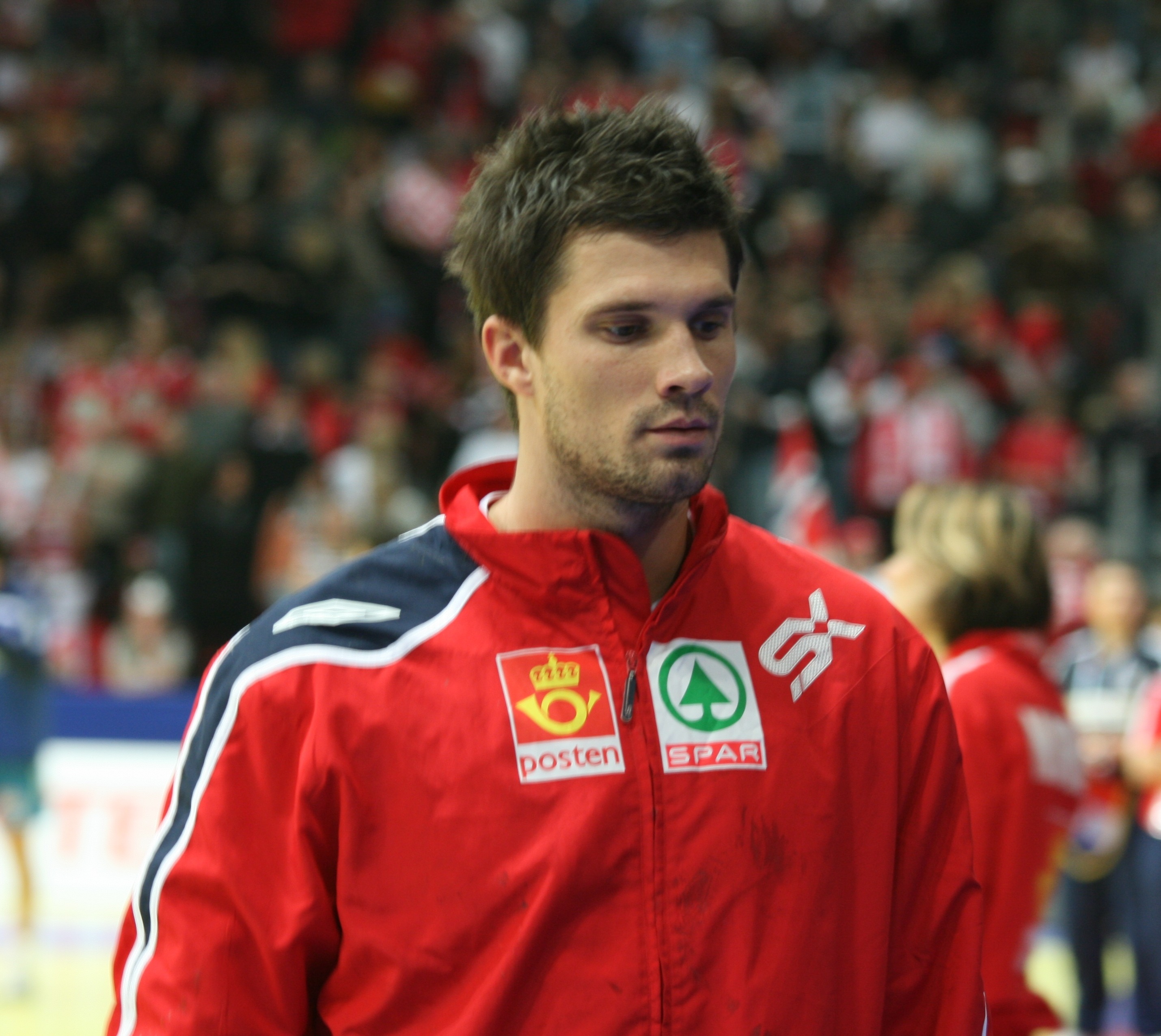 Kristian Kjelling, Norwegian handballer, in Stavanger